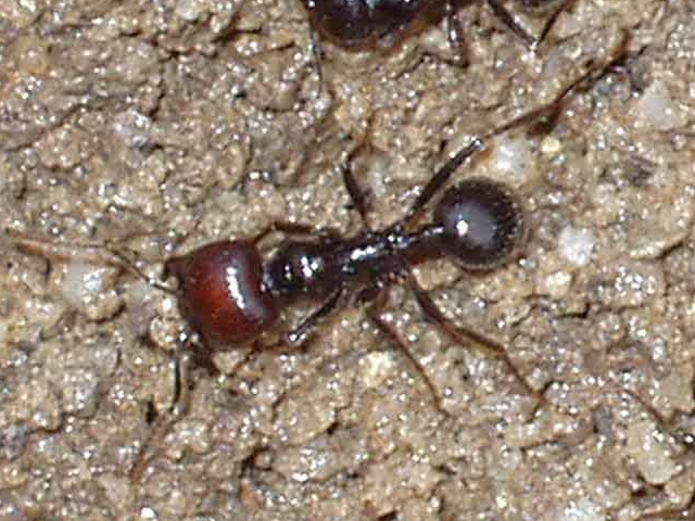 Hormiga granera (Messor barbarus)